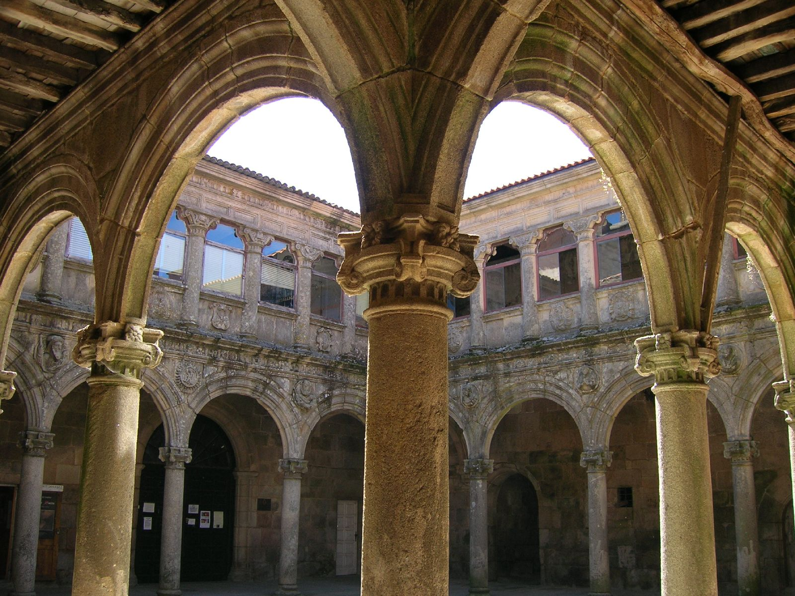 Monasterio de Montederramo. Claustro de la Portería. Obra renacentista con influencias platerescas del siglo XVI.